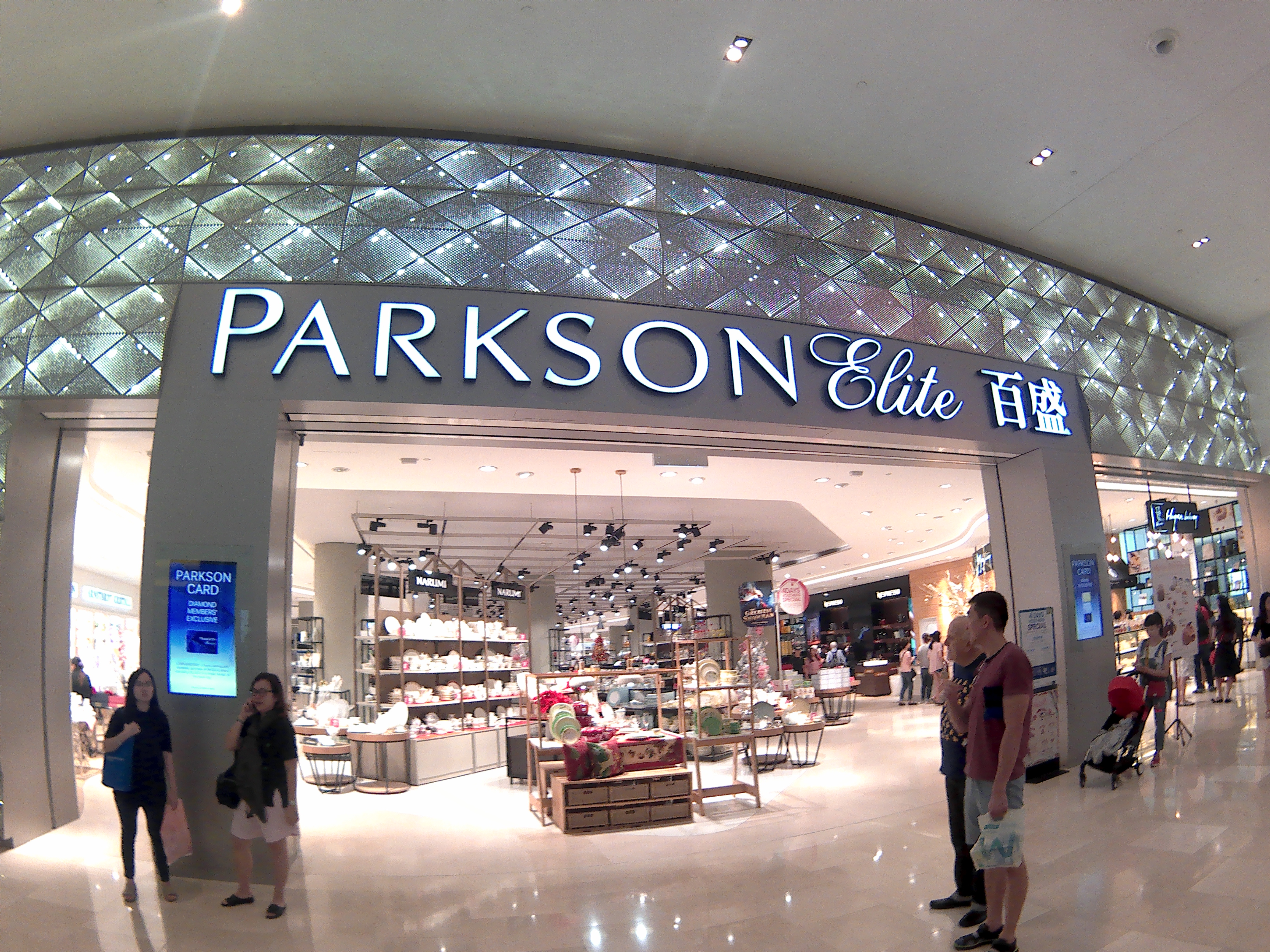 Parkson Pavilion KL